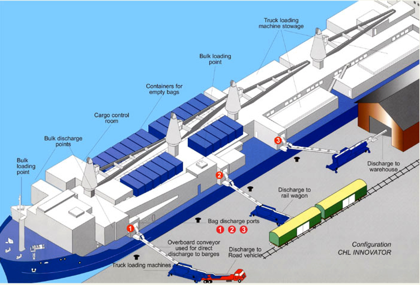 מערכת אונית צובר מתמחה ביבו